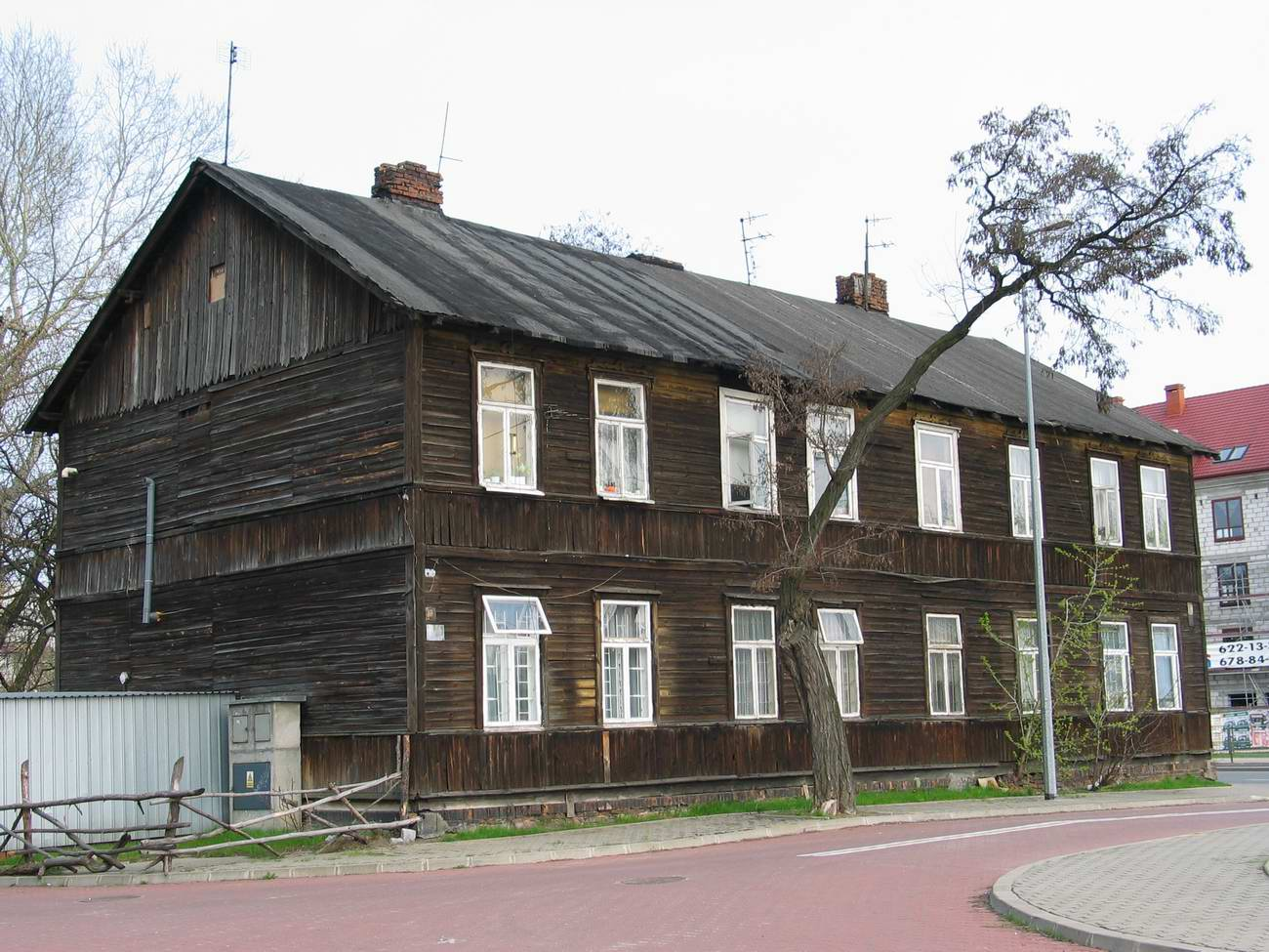 Warszawa-Targówek ul Biruty18